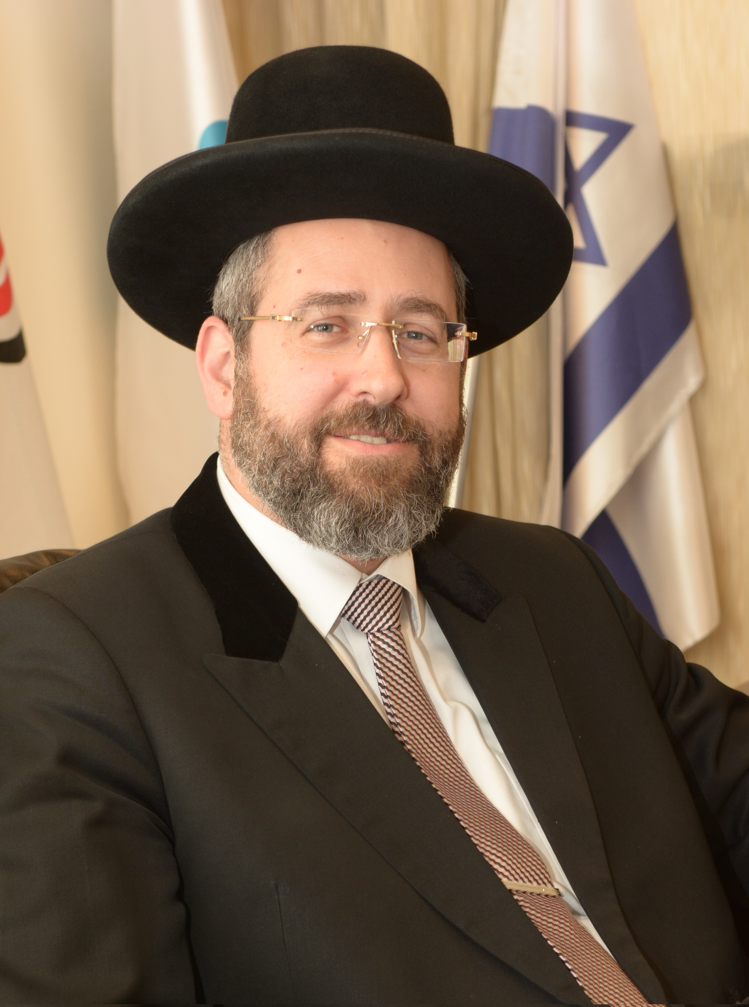 הרב דוד לאו